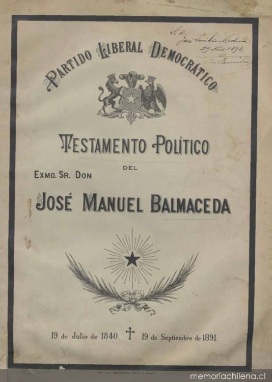 Testamento político del presidente de Chile Excelentísimo señor José Manuel Balmaceda, escrito el día que cumplía su mandato presidencial, el 18 de septiembre de 1891, horas antes de su sacrificio.